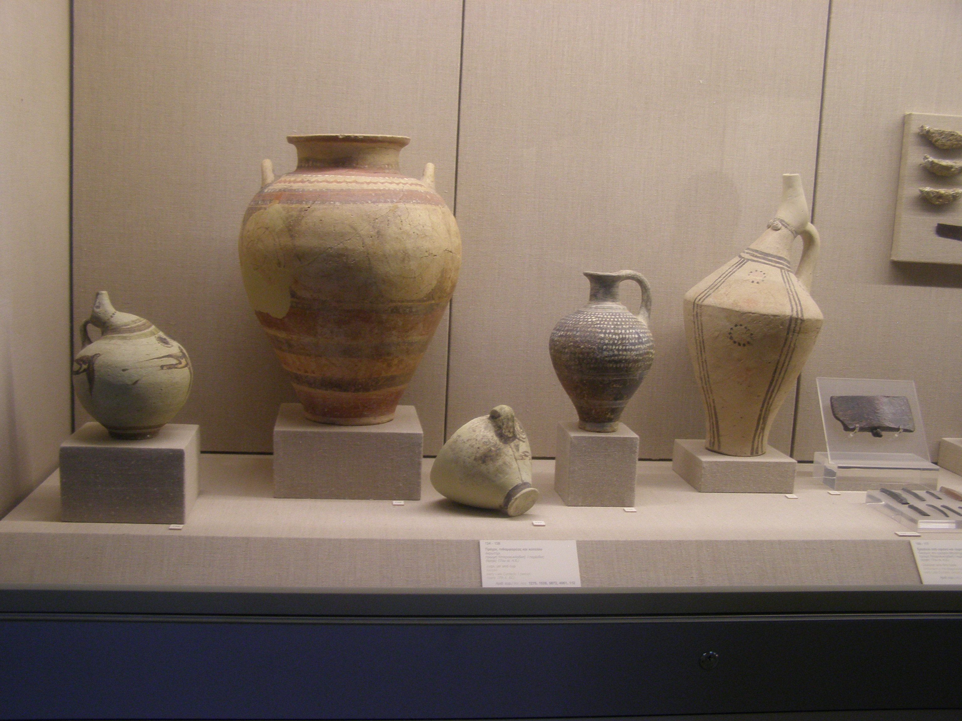 Keramika z vykopávek prehistorického města Akrotiri na ostrově Santorini.